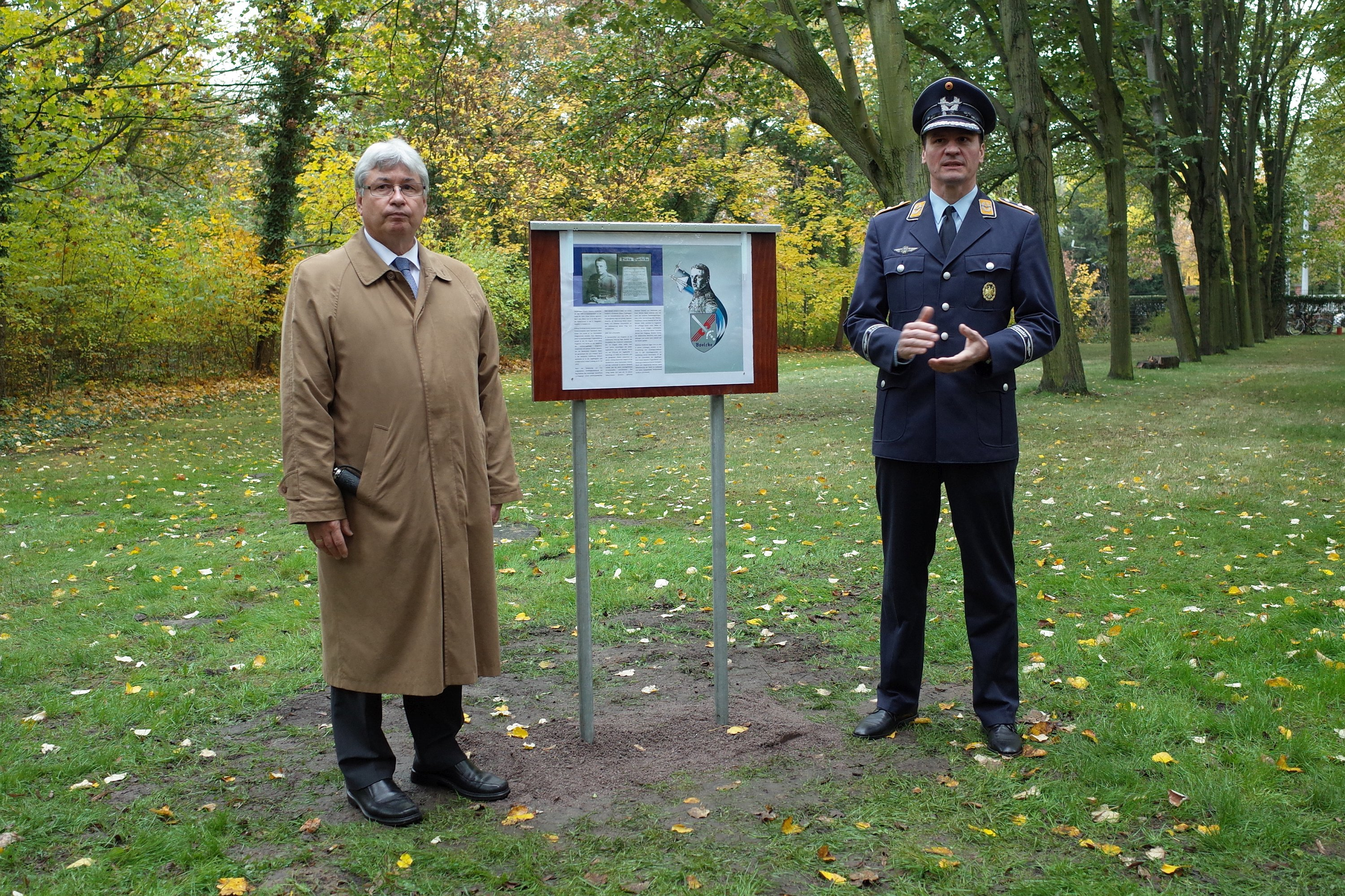 Dessau-Roßlau, Oberbürgermeister Peter Kuras (links) bei der Einweihung der Informationstafel über Oswald Boelke auf dem Ehrenfriedhof.